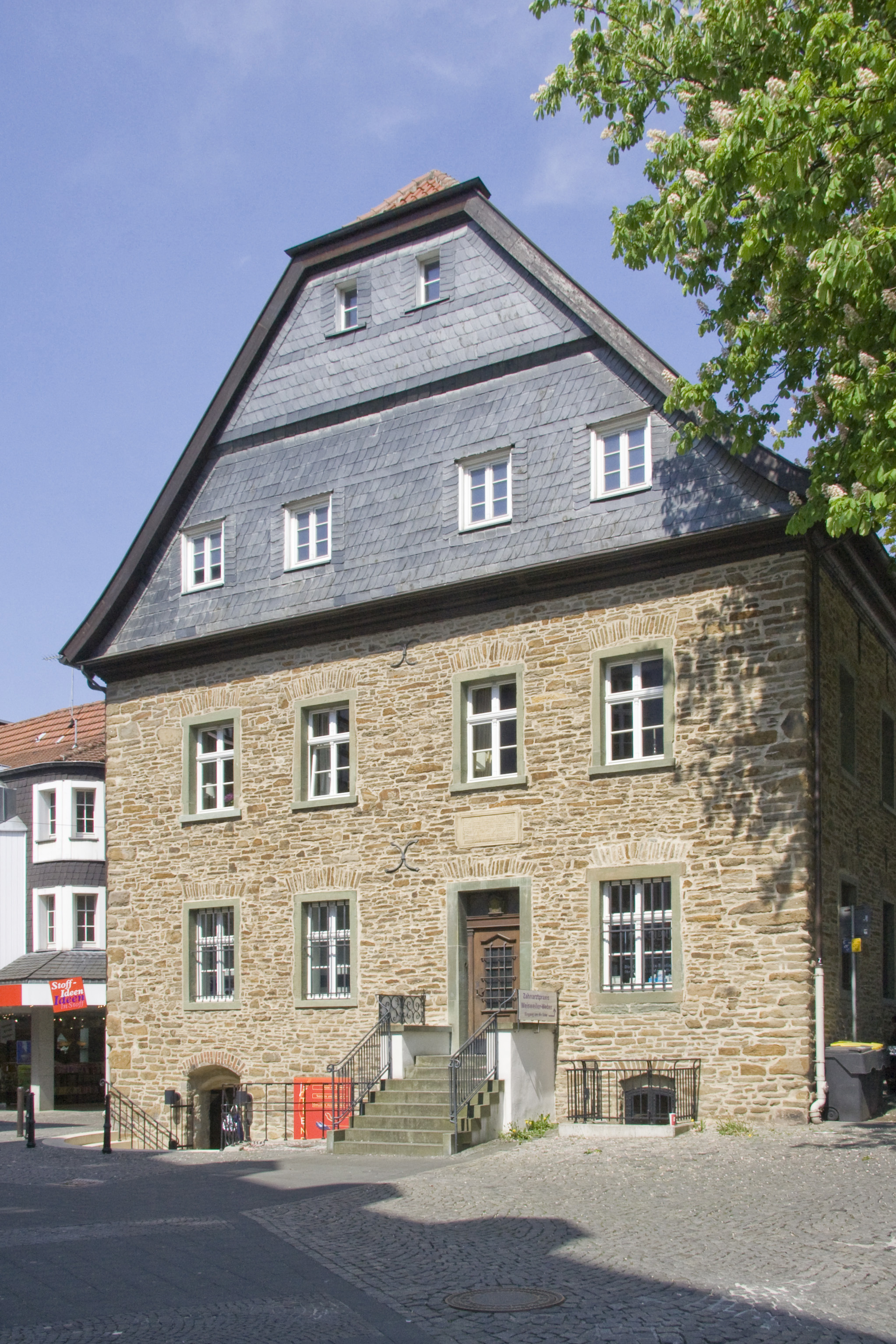 Alte Apotheke in Menden, Marktplatz 4